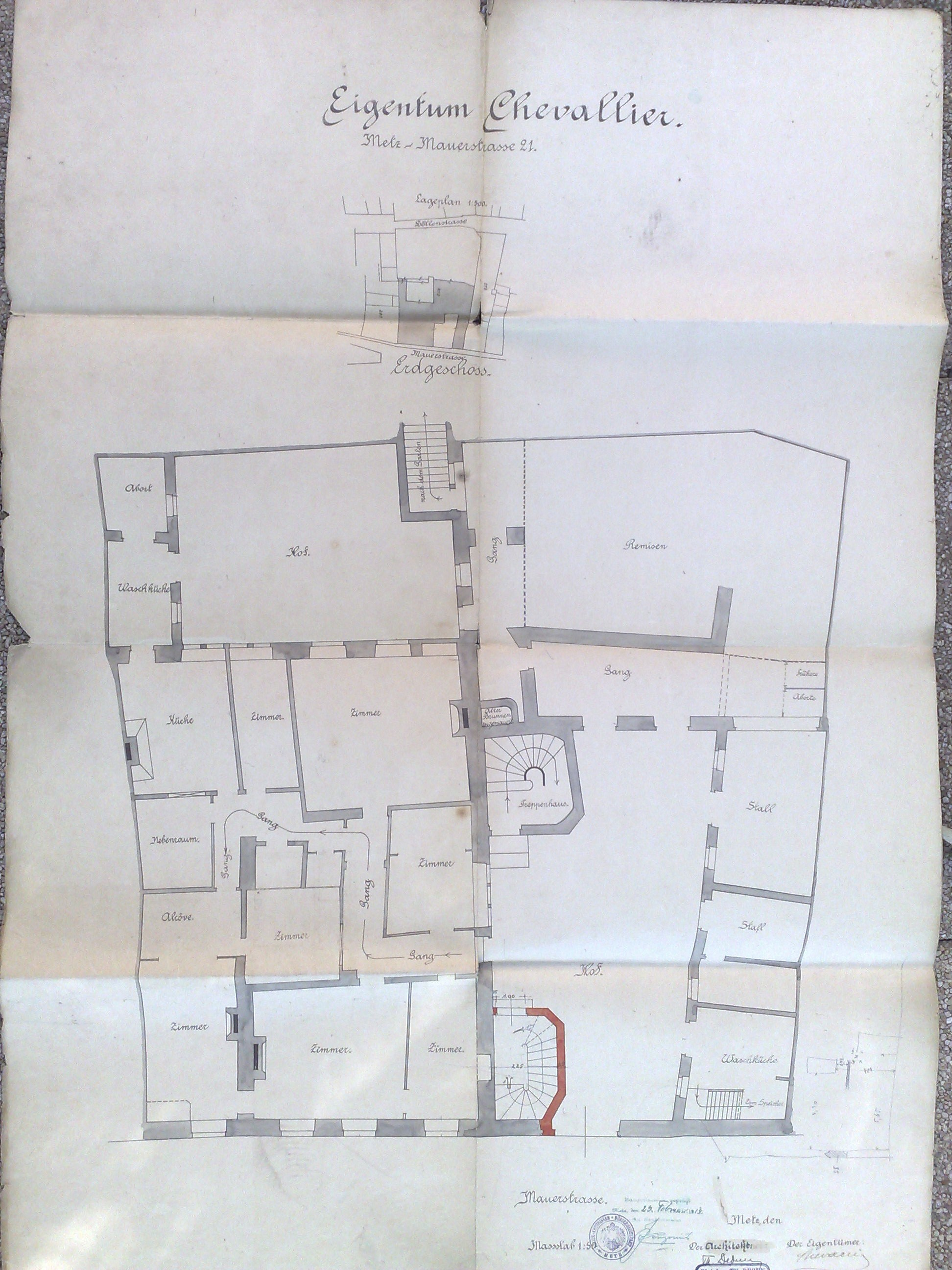 Plan de l'hotel de Malte, rue des Murs, à Metz, mettant en valeur l'ajout d'une tourelle.